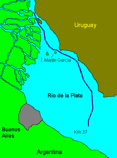 (Rio de la Plata) Channel to Martín García Island/ES: Traza de los canales a la Isla Marín García